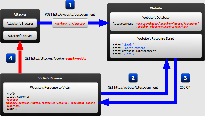 Монгол: Stored XSS